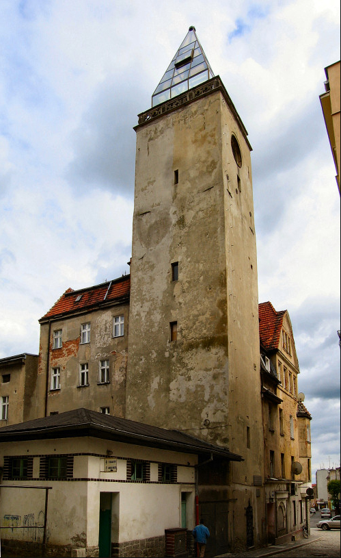 Strzegom - wieża ratuszowa (targowa)